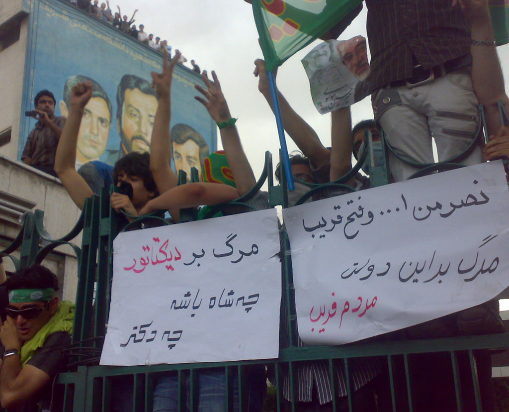 همراهی دانشجویان دانشگاه شریف با راه‌پیمایان معترض به تخلف در انتخابات ریاست جمهوری ۱۳۸۸ در خیابان آزادی